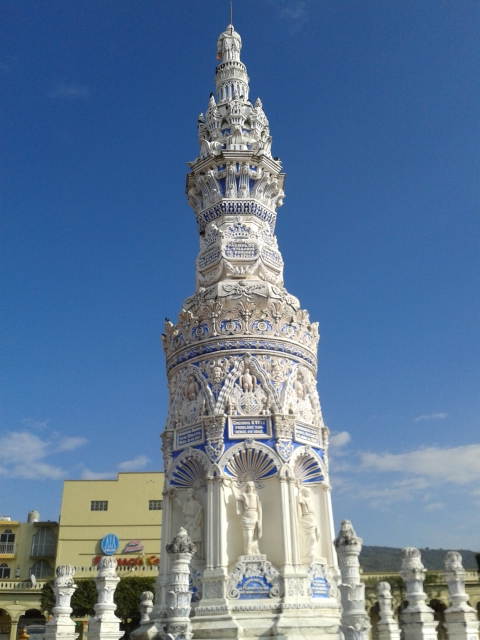 Obelisco hecho en honor al Papa Pio IX ubicado en Jamay , Jalisco , México